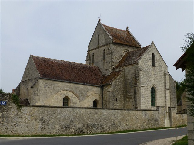 Village Nanteuil-Notre-Dame (Eglise)